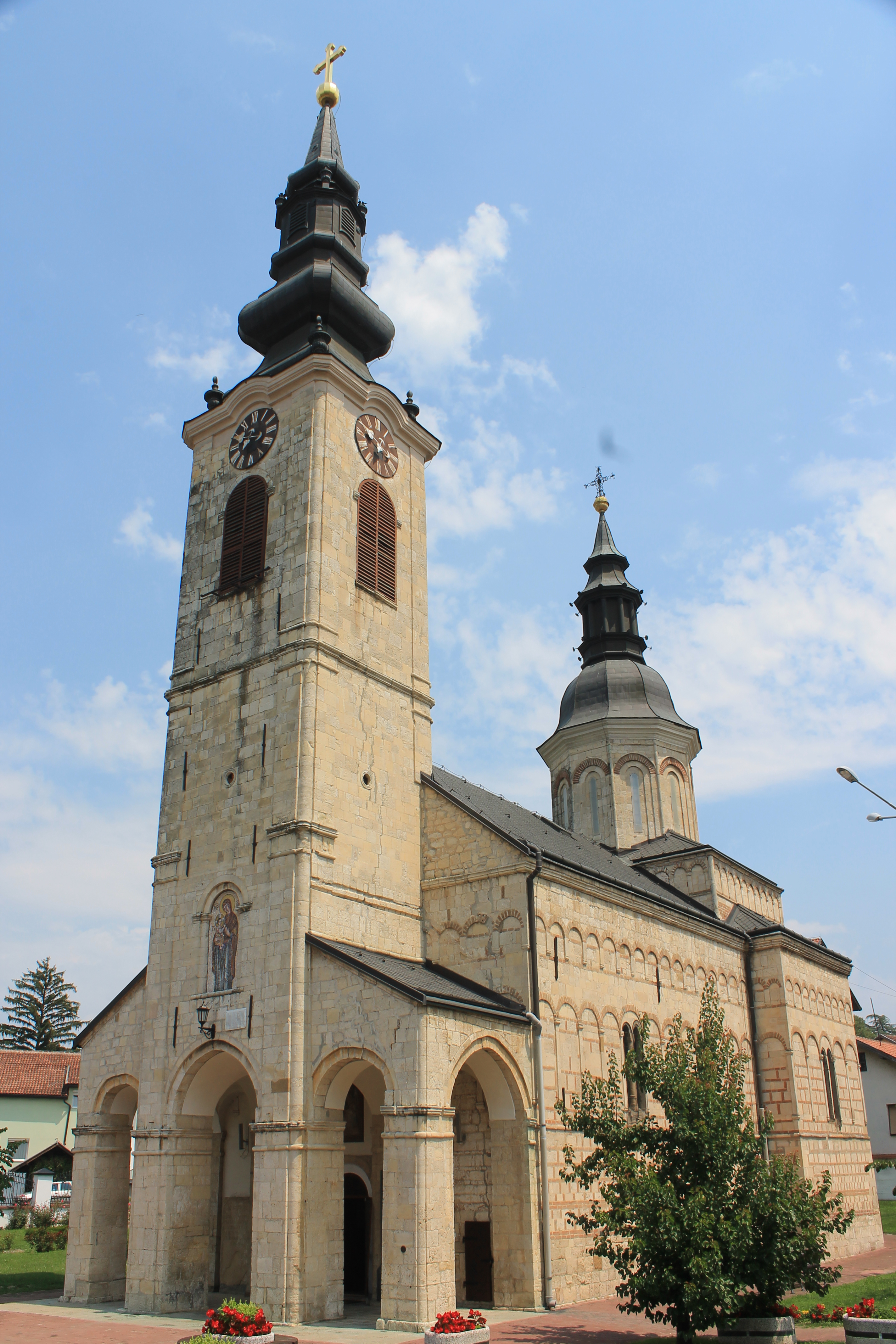 Crkva Rođenja Presvete Bogorodice (Sremska Kamenica), jul 2018.